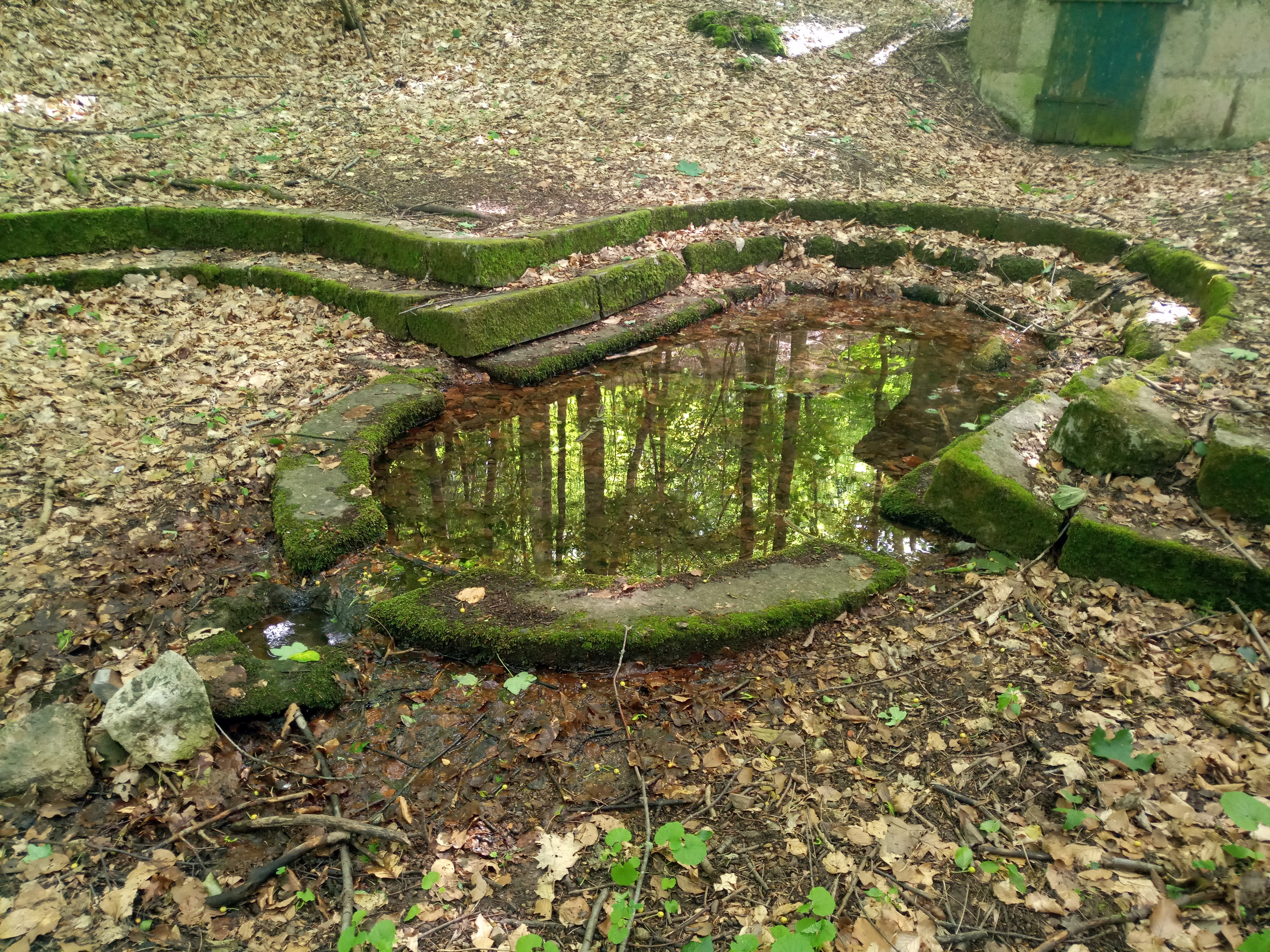 Klause Börrstadt Quellfassung